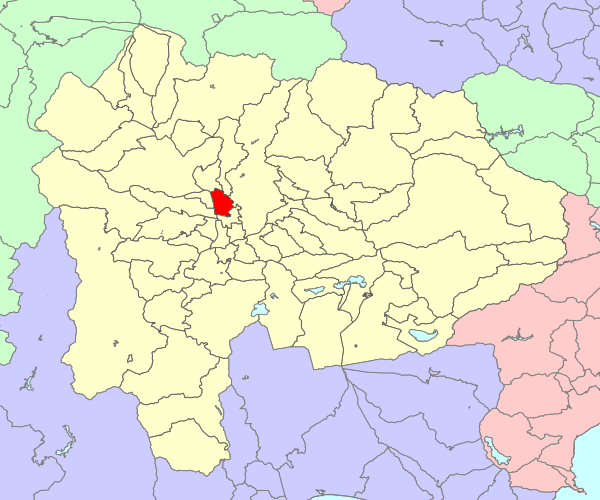 山梨県中巨摩郡竜王町の位置画像。